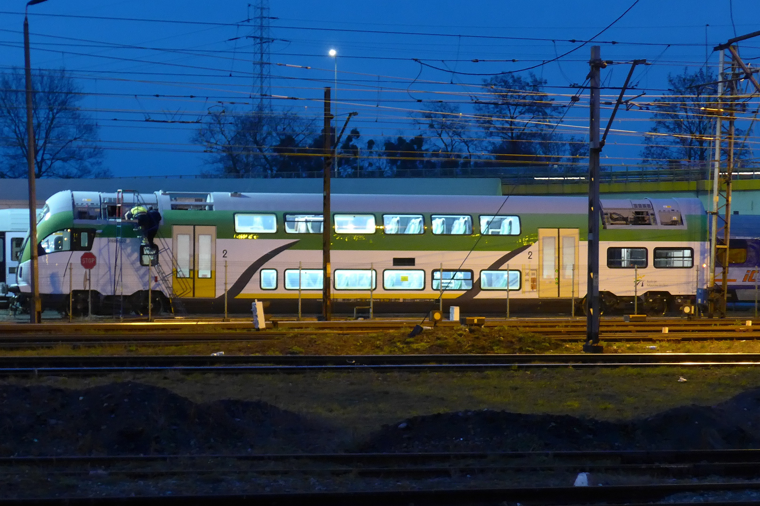 Wagon sterowniczy PESA Sundeck w czasie budowy na terenie firmy.